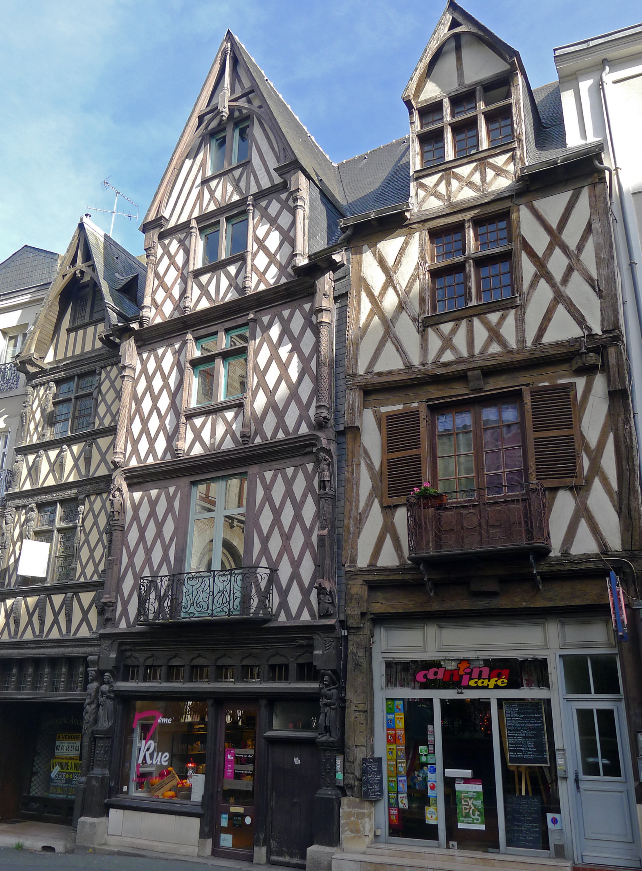 Maisons à colombages de la rue de l'Oisellerie (n°5,7,9) - Angers, France .